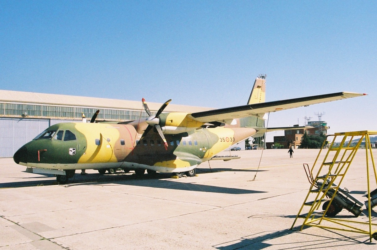 Avion de Transporte CASA CN-235 del Ejercito del Aire Español